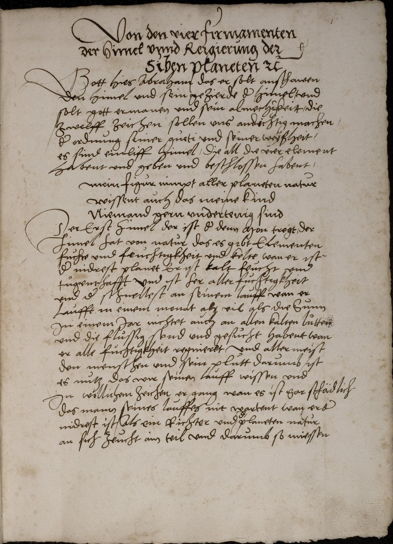 Codex Palatinus germanicus 1, "Astrologisch-medizinische Sammelhandschrift", Blatt 1r der Handschrift: "Planetentraktat"